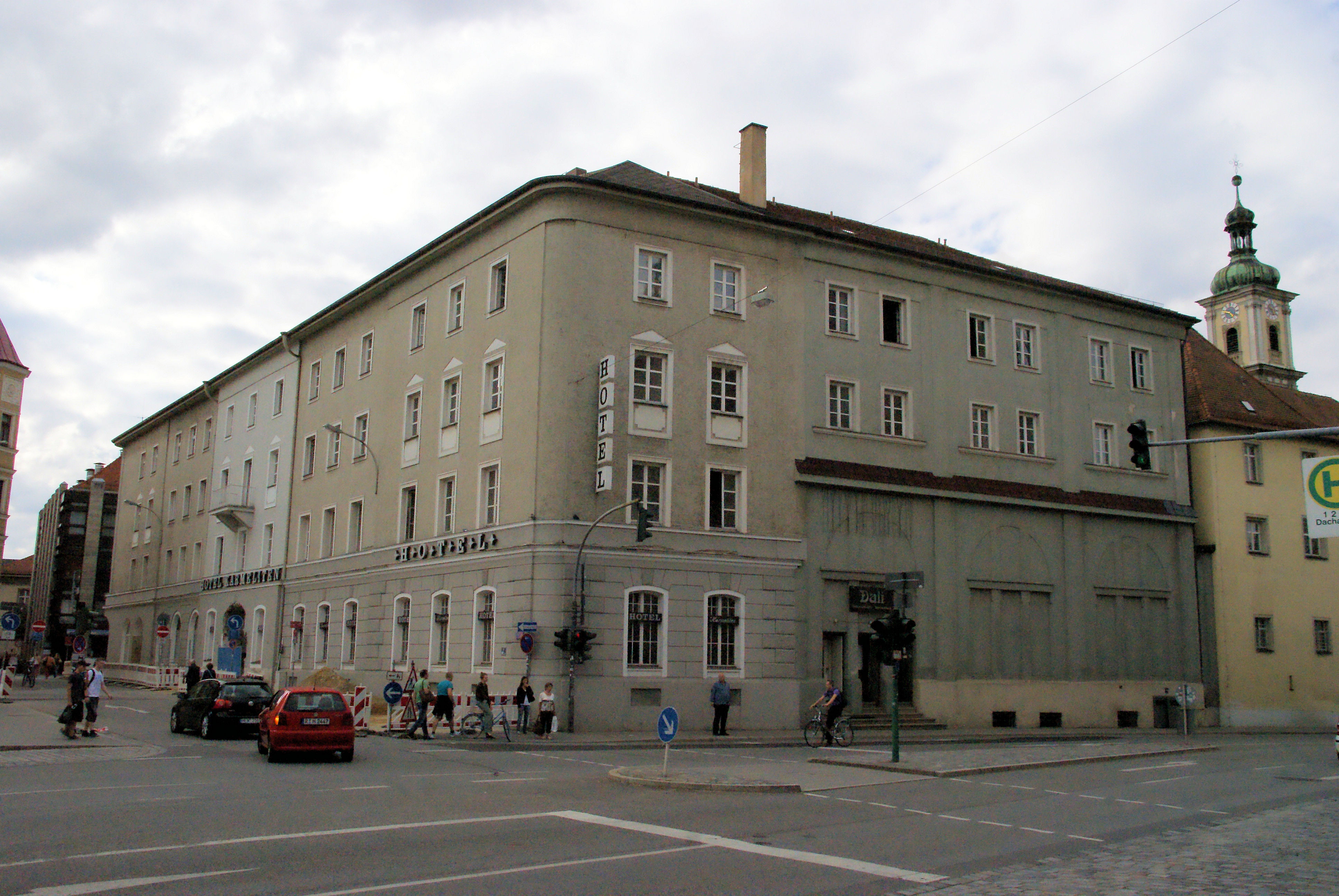 Das Hotel Karmeliten in Regensburg kurz vor dem Abbruch